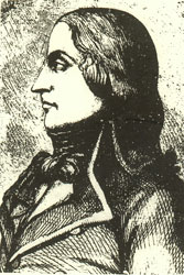 Jean-Michel Beysser (1753-1794)